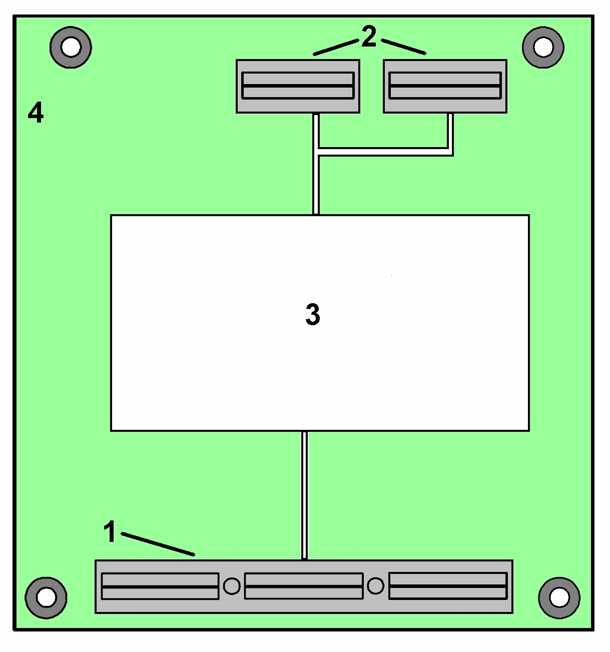 Адаптерный модуль для PCIe/104 с электронным блоком (патент Украины на полезную модель №38252)